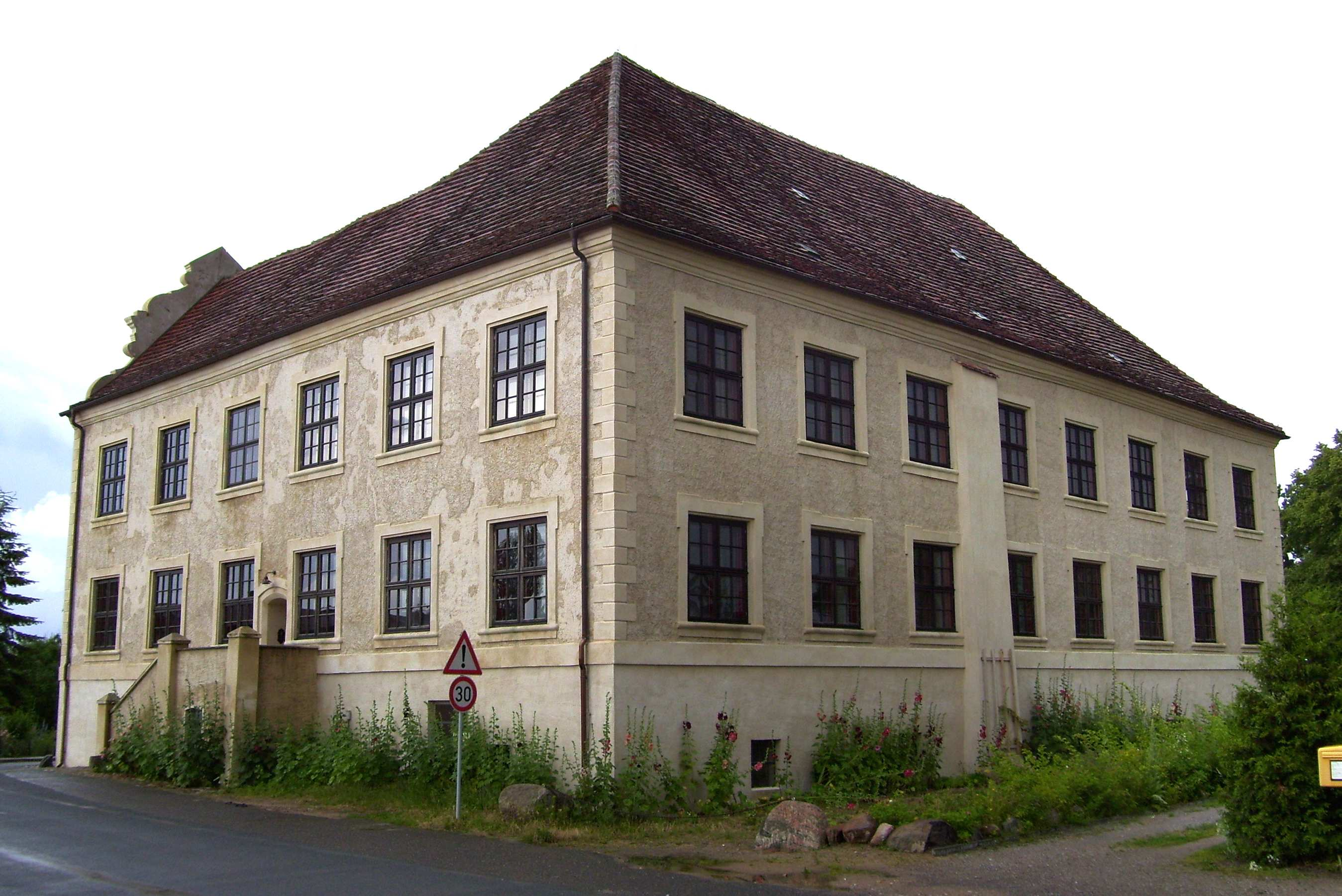 Schmarsow Landkreis Demmin - Schloss Schmarsow - West und Südseite